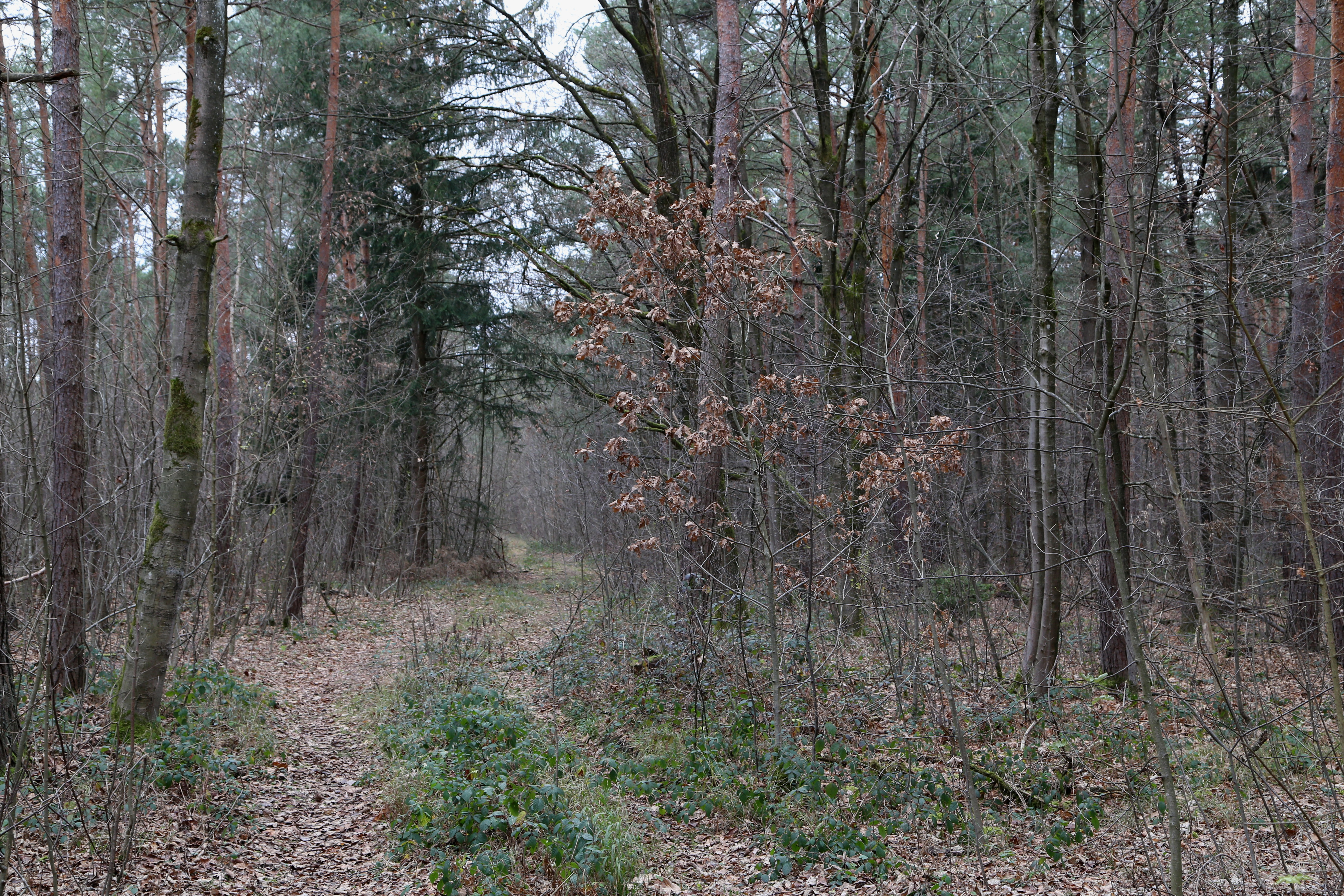 Hartelholz, Naturschutzgebiet Panzerwiese und Hartelholz, München-Hasenbergl